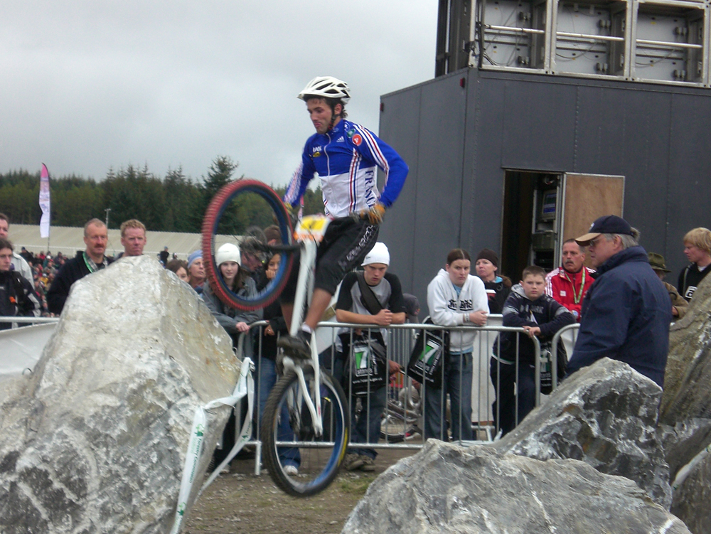 O ciclista francés Marc Caisso disputando a proba de trial durante o Mundial de trial de 2007, en Fort William (Escocia). Licensing Categoría:Imaxes de Escocia Categoría:Imaxes de ciclismo